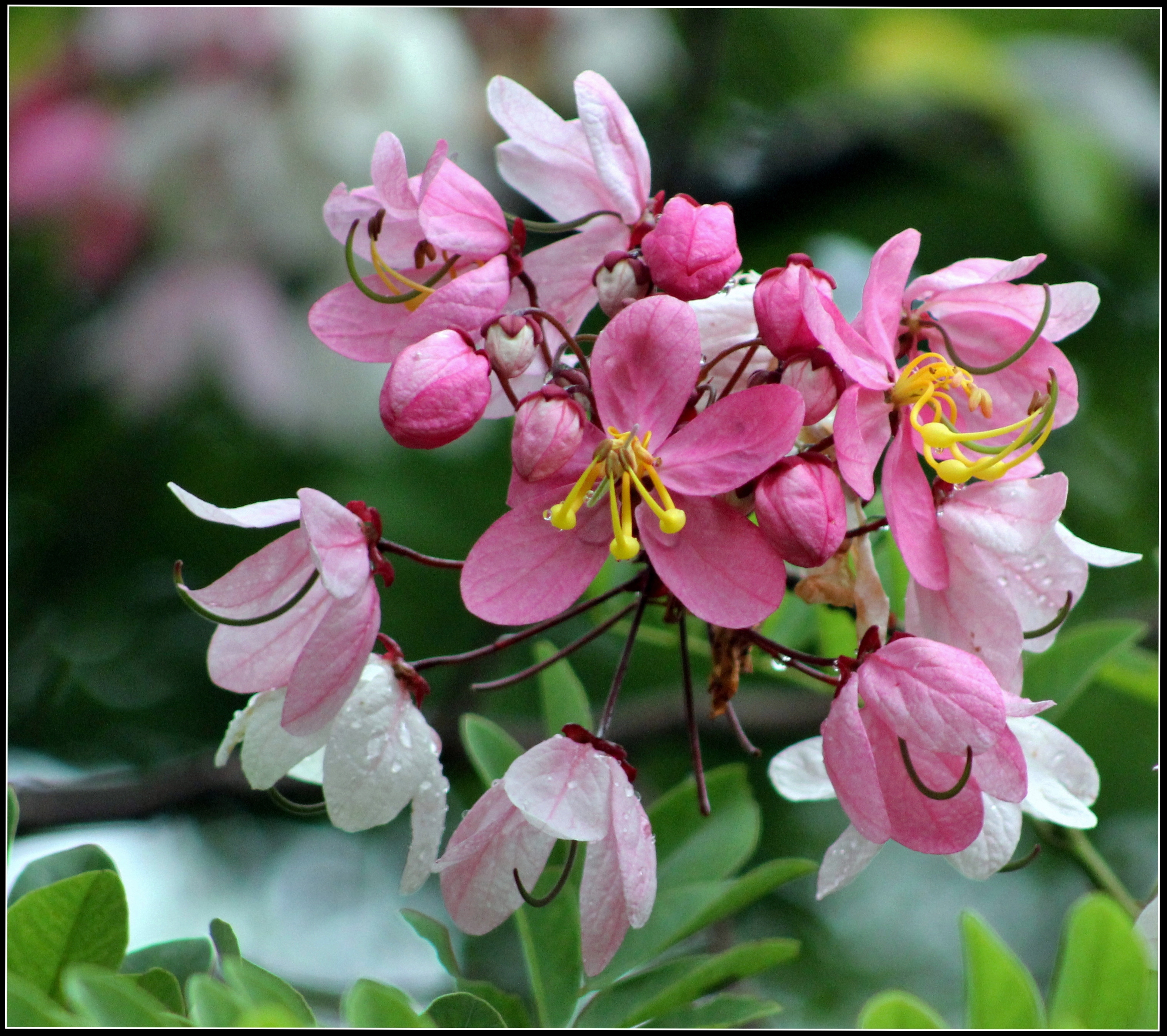 FLOWERS #4